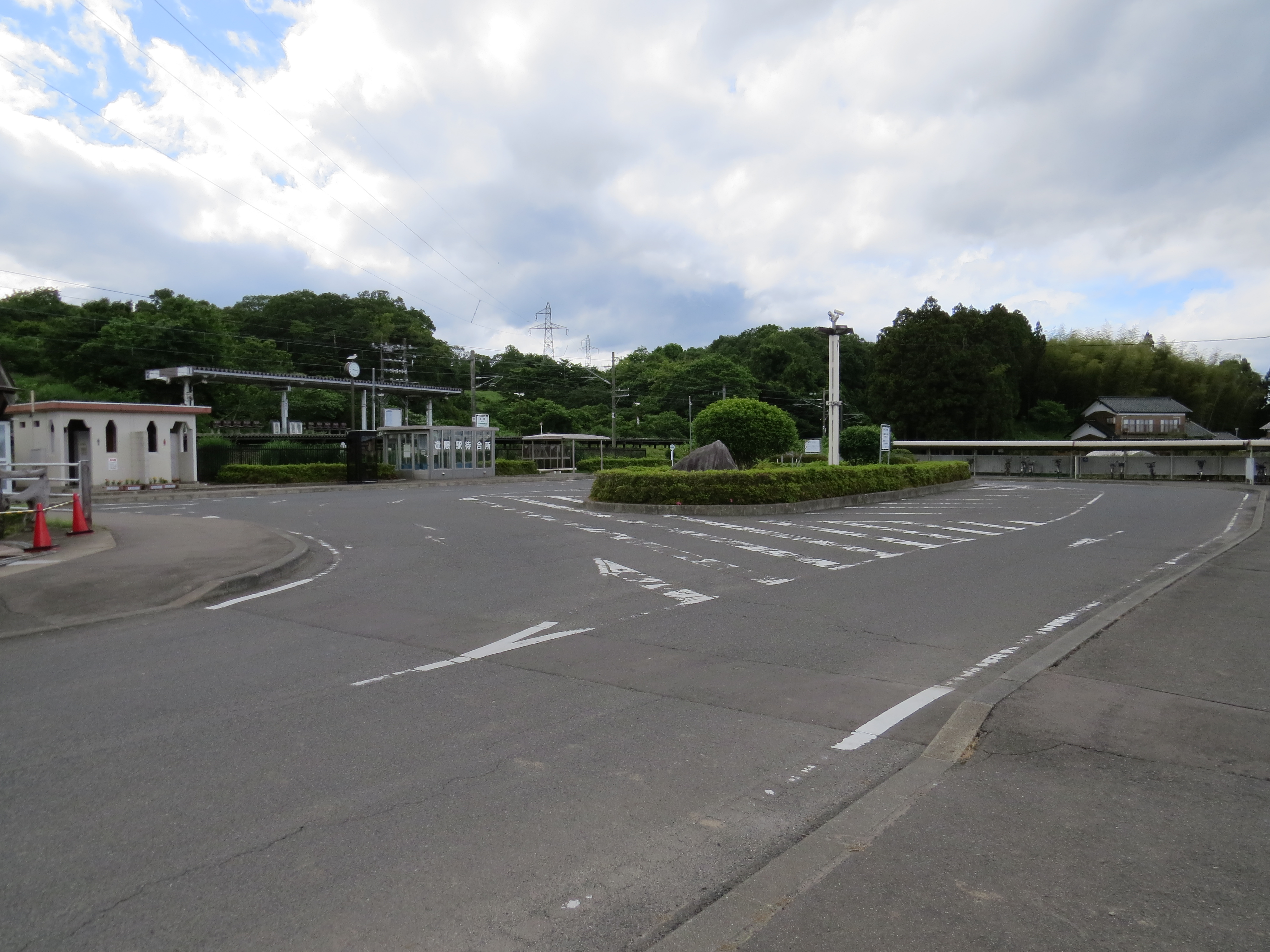 JR東日本 逢隈駅 ロータリー